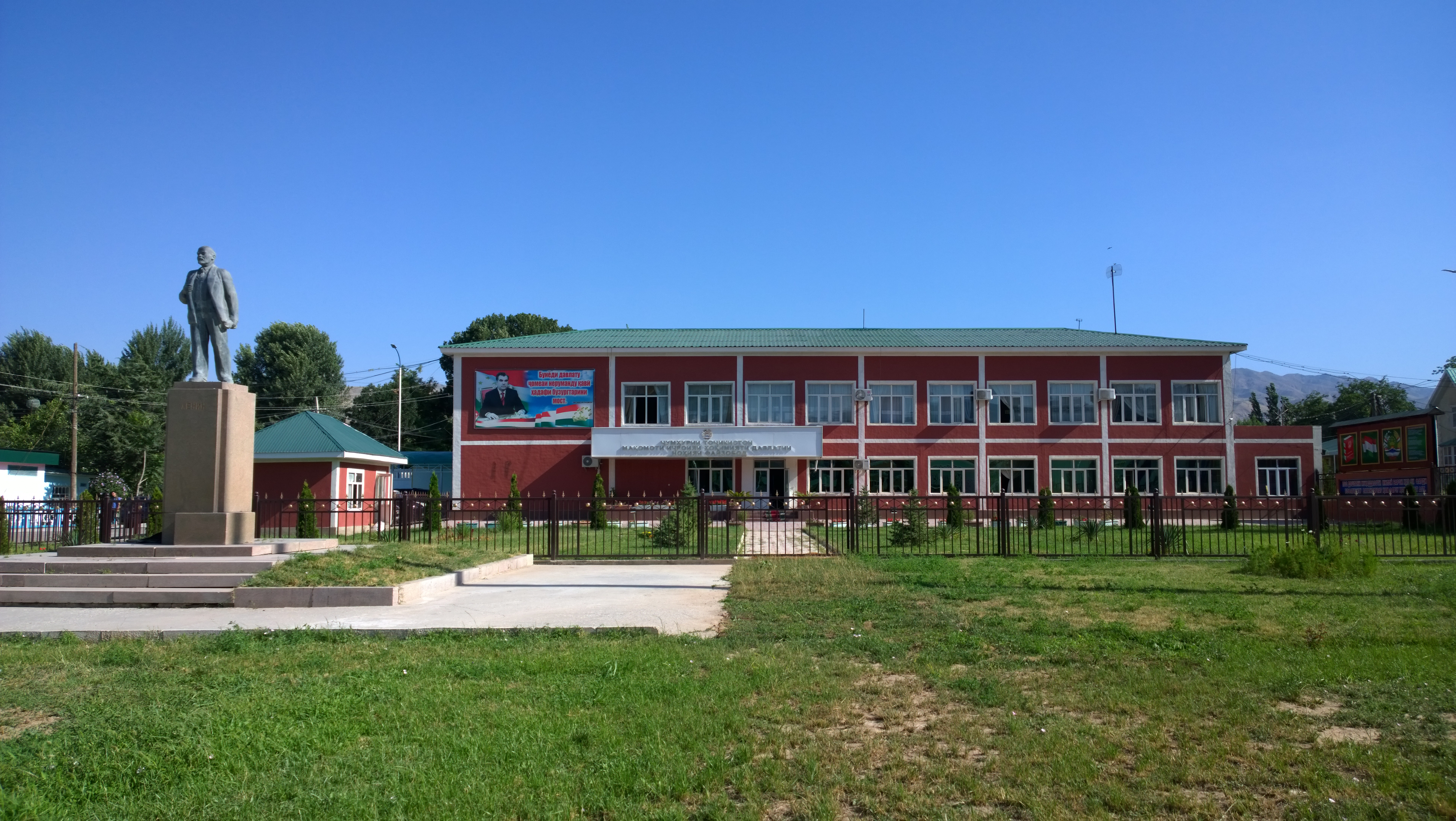 Тоҷикӣ: Бинои ҳукумати ноҳияи Файзобод